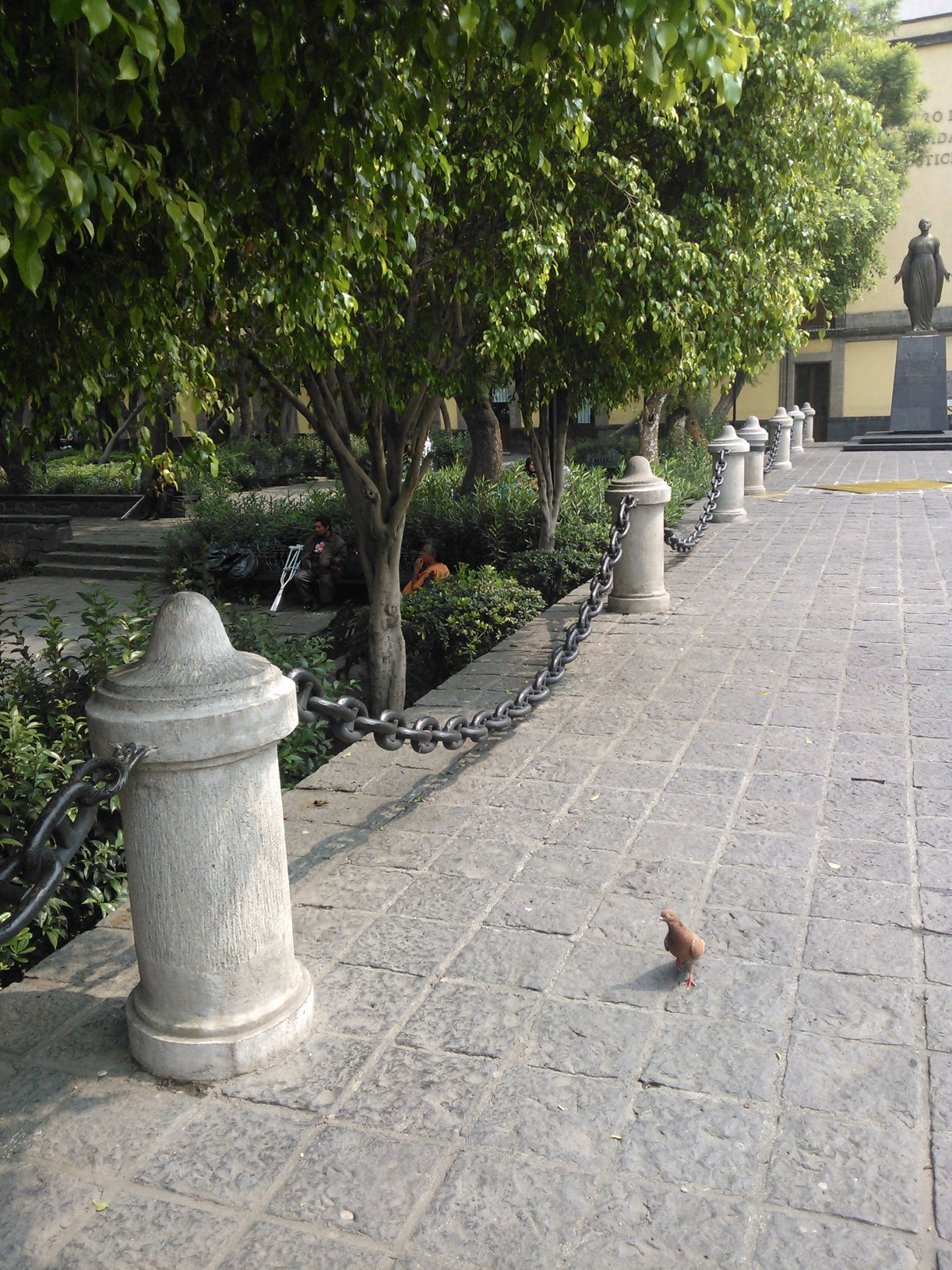 Los últimos elementos pétreos del paseo de las cadenas de la Catedral Metropolitana